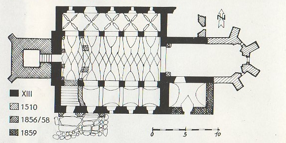 Planul bisericii evanghelice din Altana.